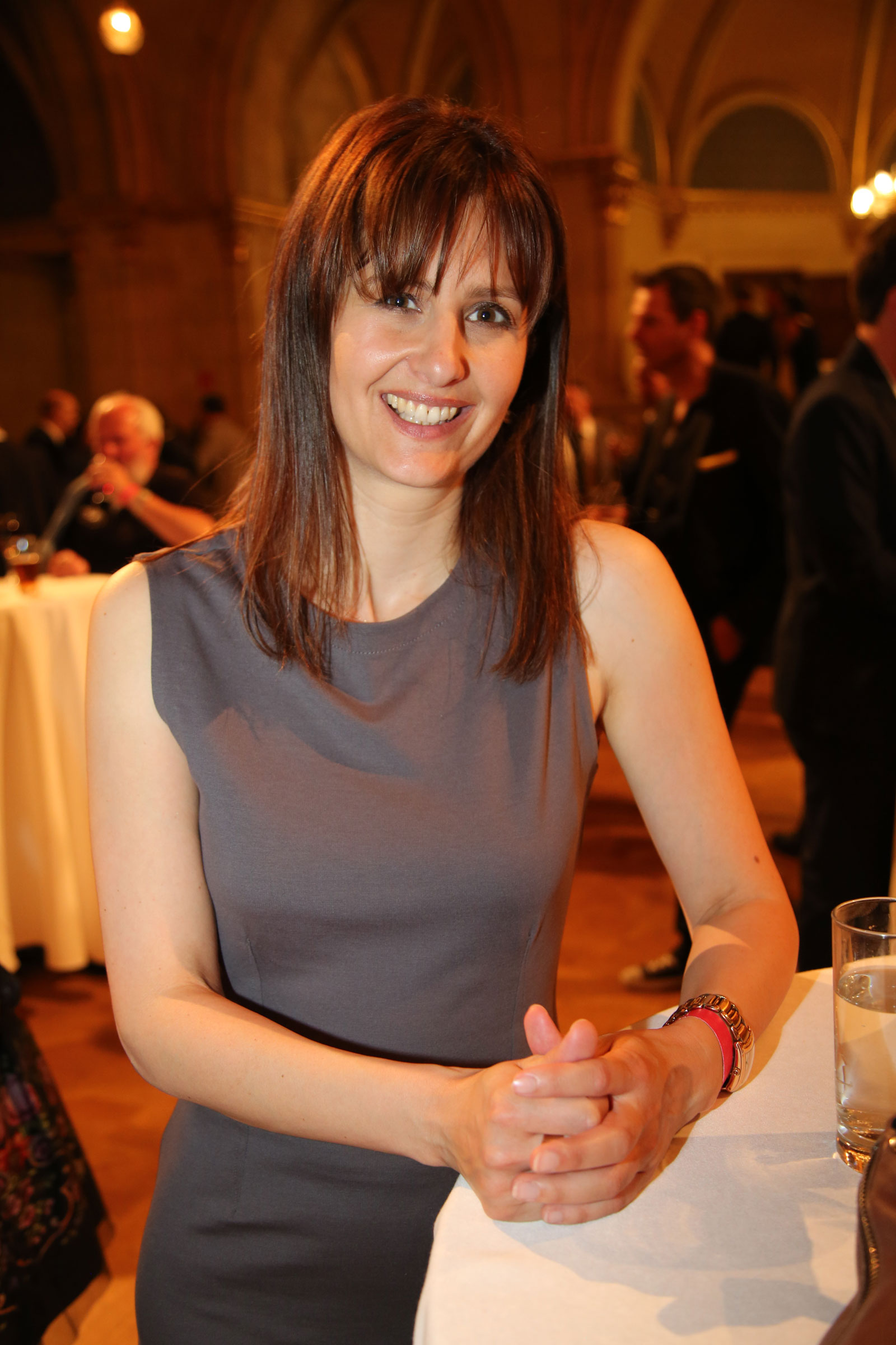 Zeller_Daniela-5654